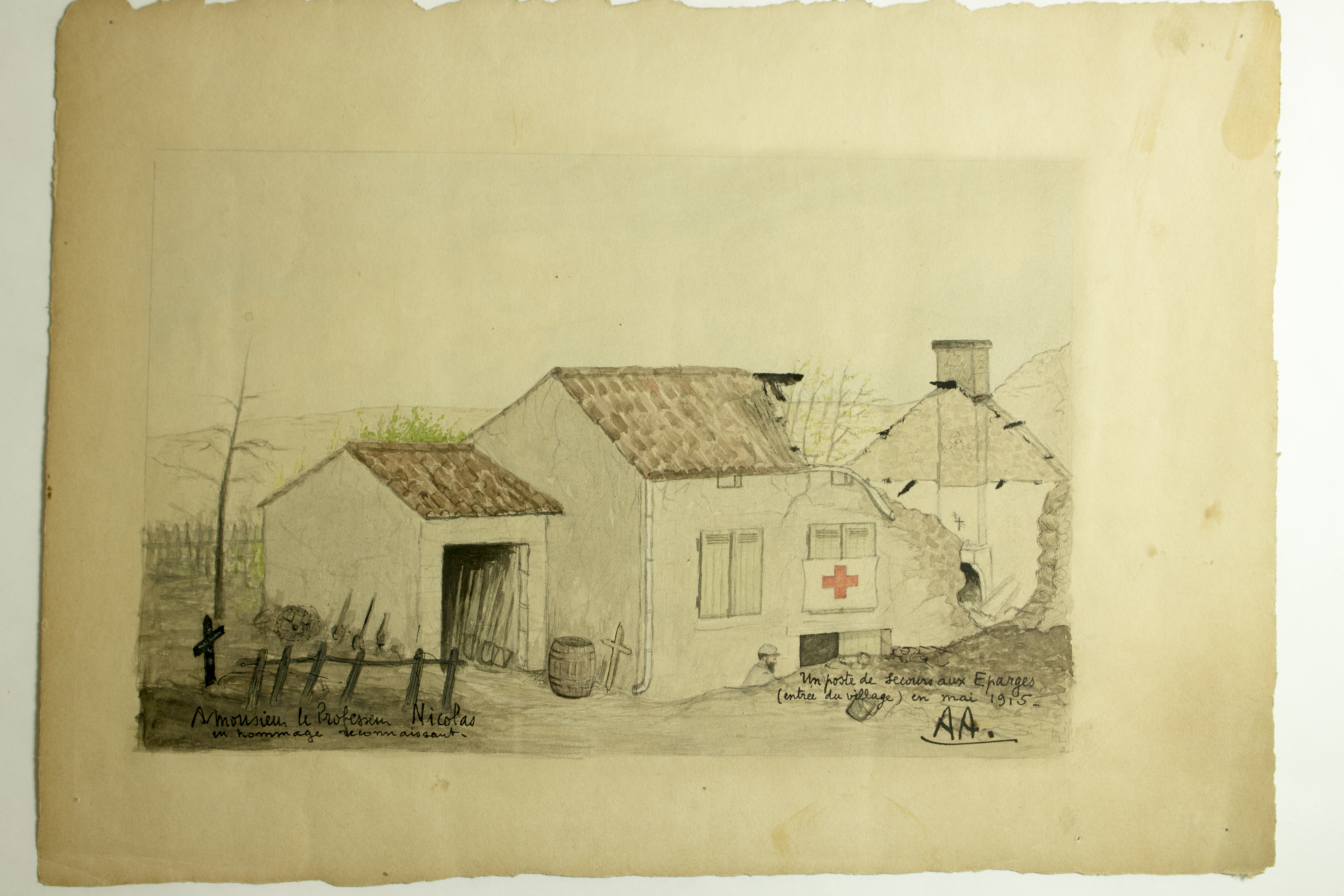 Inventaire n° 2007.0.957.M Aquarelle. auteur anonyme, sur papier, dessin mine de plomb Signature : "monogramme en bas à droite : A.A ; Inscription (au-dessus du monogramme) : "un poste de secours aux Éparges (entrée du village) en mai 1915" ; Dédicace en bas à gauche : "A Monsieur le Professeur Nicolas un hommage reconnaissant" Description : La scène représente le poste de secours avec à droite le bâtiment principal, sur lequel est encore accroché le drapeau de la Croix Rouge, éventré par un obus. Devant la façade, un homme, en partie caché derrière les débris, semble déblayer la porte d’entrée. A gauche, dans la grange intacte, on distingue des pioches. Devant, un tonneau et une croix sont appuyés contre le mur latéral. Au dessus de la dédicace, derrière une barrière, une tombe en terre est représentée avec une simple croix de bois. Contexte historique : Le village des Éparges près de Verdun est resté tristement célèbre en raison de la bataille qui s’est déroulée entre février et avril 1915, pendant laquelle l’armée allemande, qui tenait la crête au dessus du village, a fait des milliers de morts dans les troupes françaises. Bibliographie : Guide des champs de bataille, Ypres, Michelin, 1920